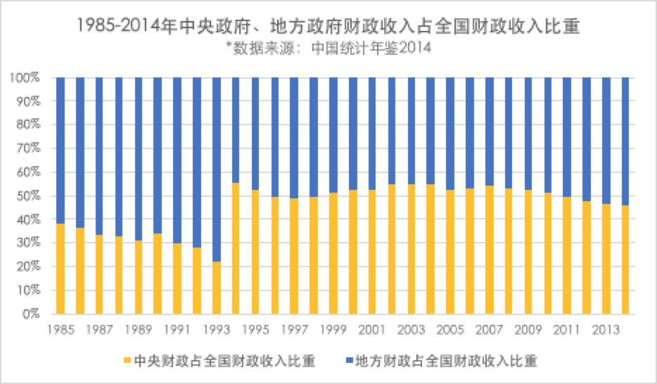 中文（中国大陆）: 1985-2014年中央政府、地方政府财政收入占全国财政收入比重简体版